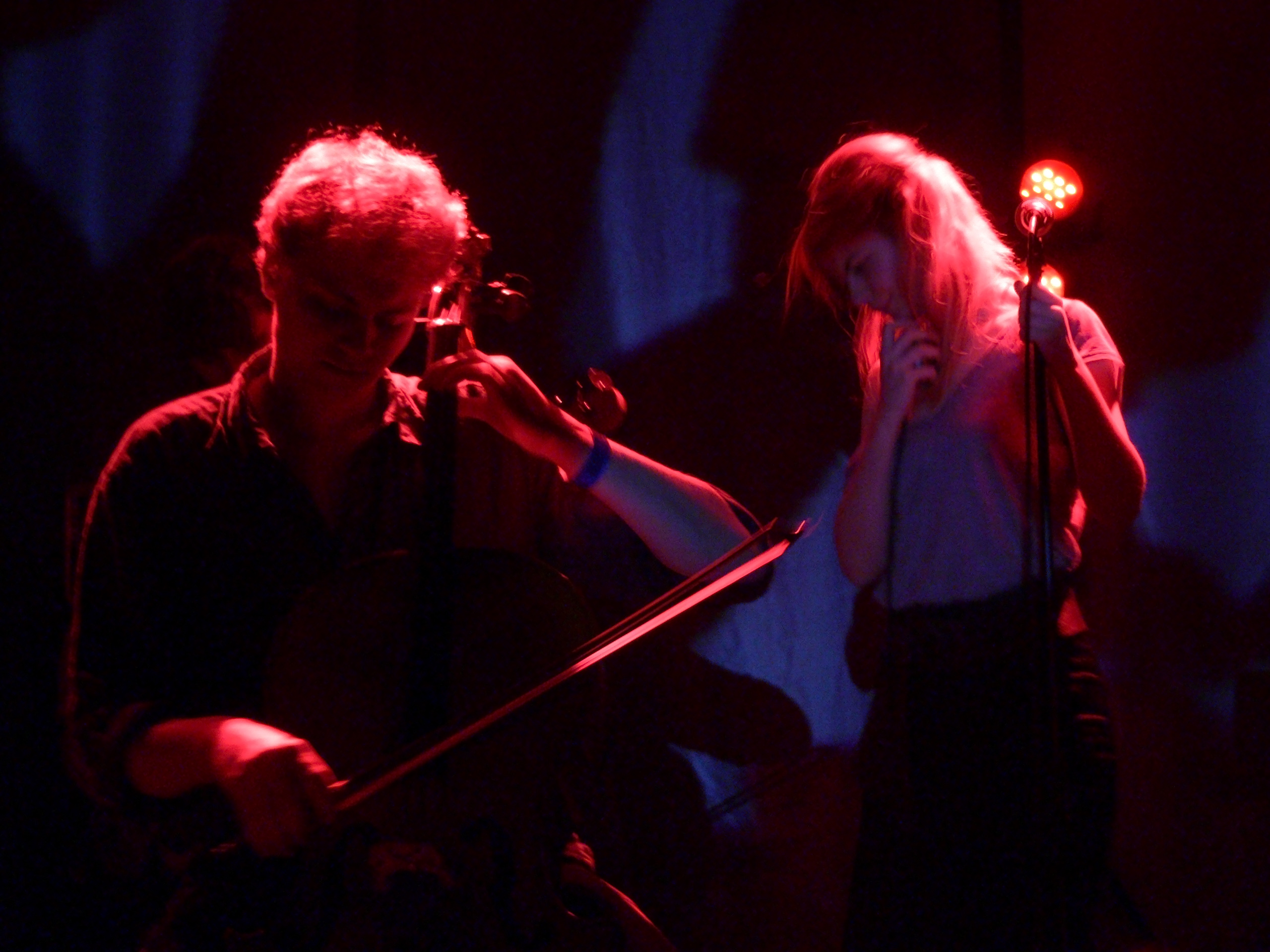 Henriette Sennenvaldt (vocal) and Morten Svenstrup (cello) of Under Byen